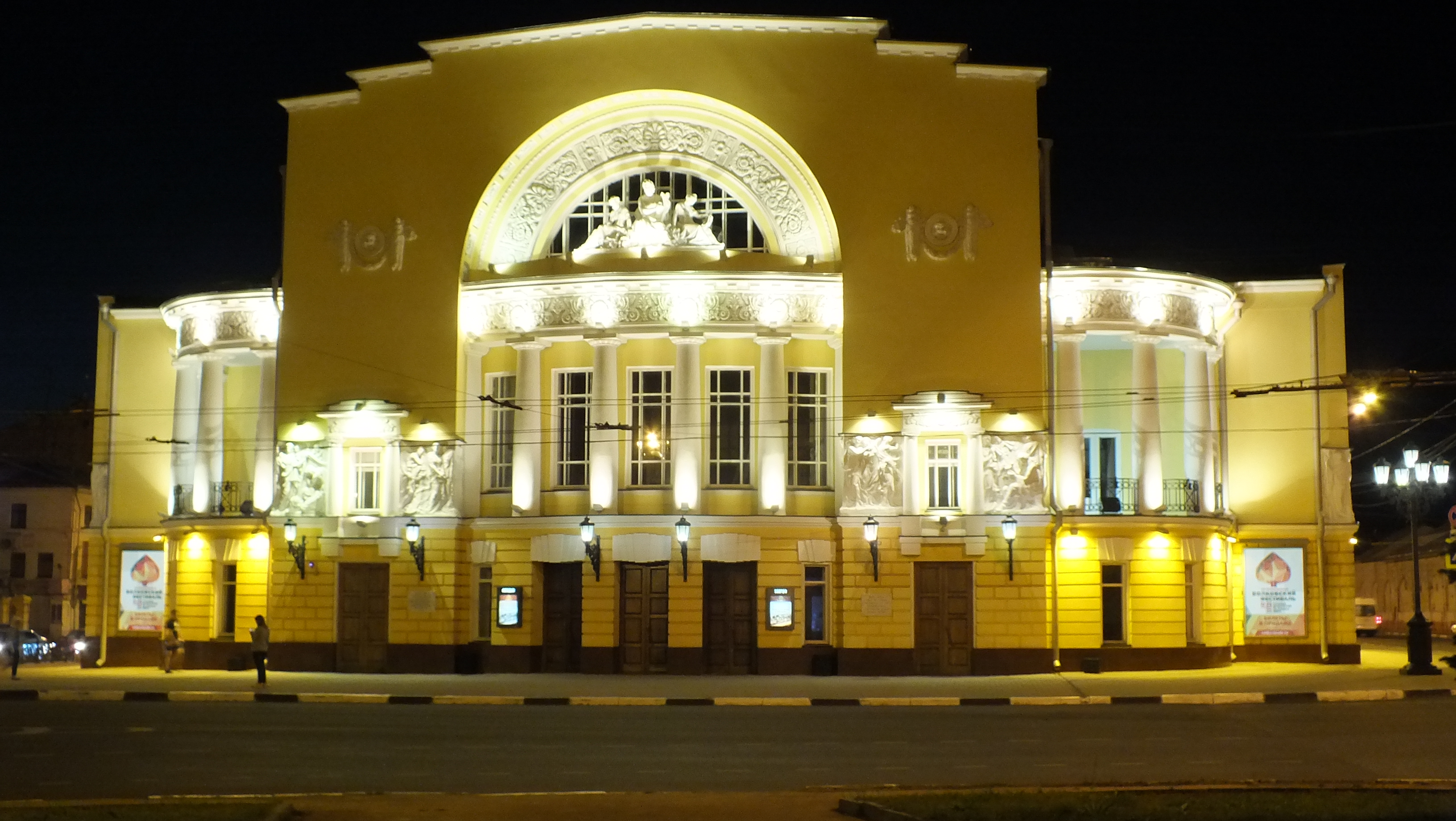 Здание городского театра имени Волкова (площадь Волкова, 1, Ярославль, Ярославская область) ночью